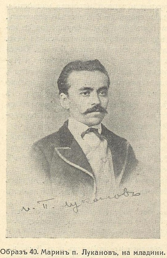 Ловеч и Ловчанско, книга 3, 1931, стр. 150 - Марин п. Луканов на младини